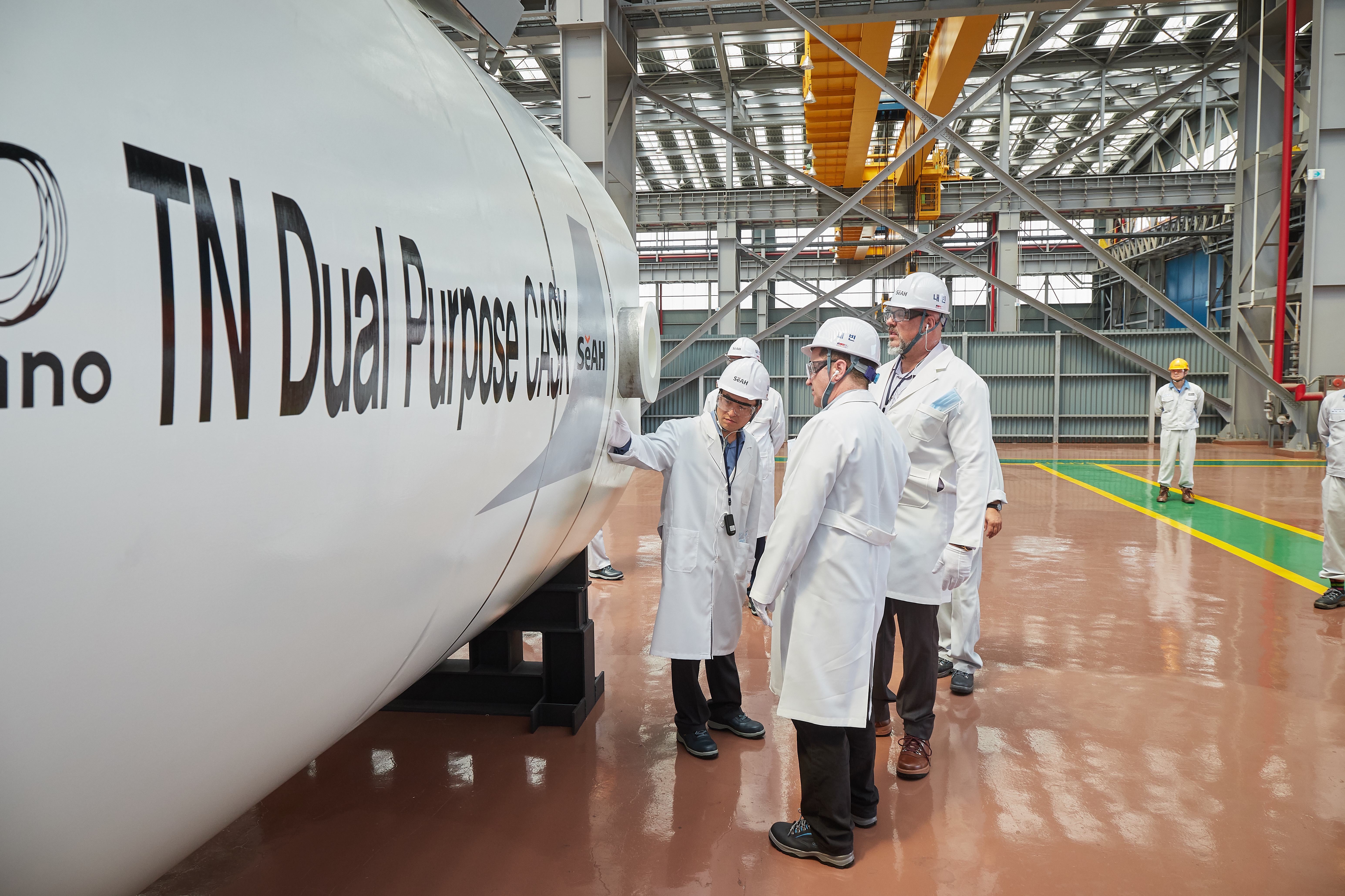 세아베스틸 CASK 제품을 관계자가 둘러보고 있다